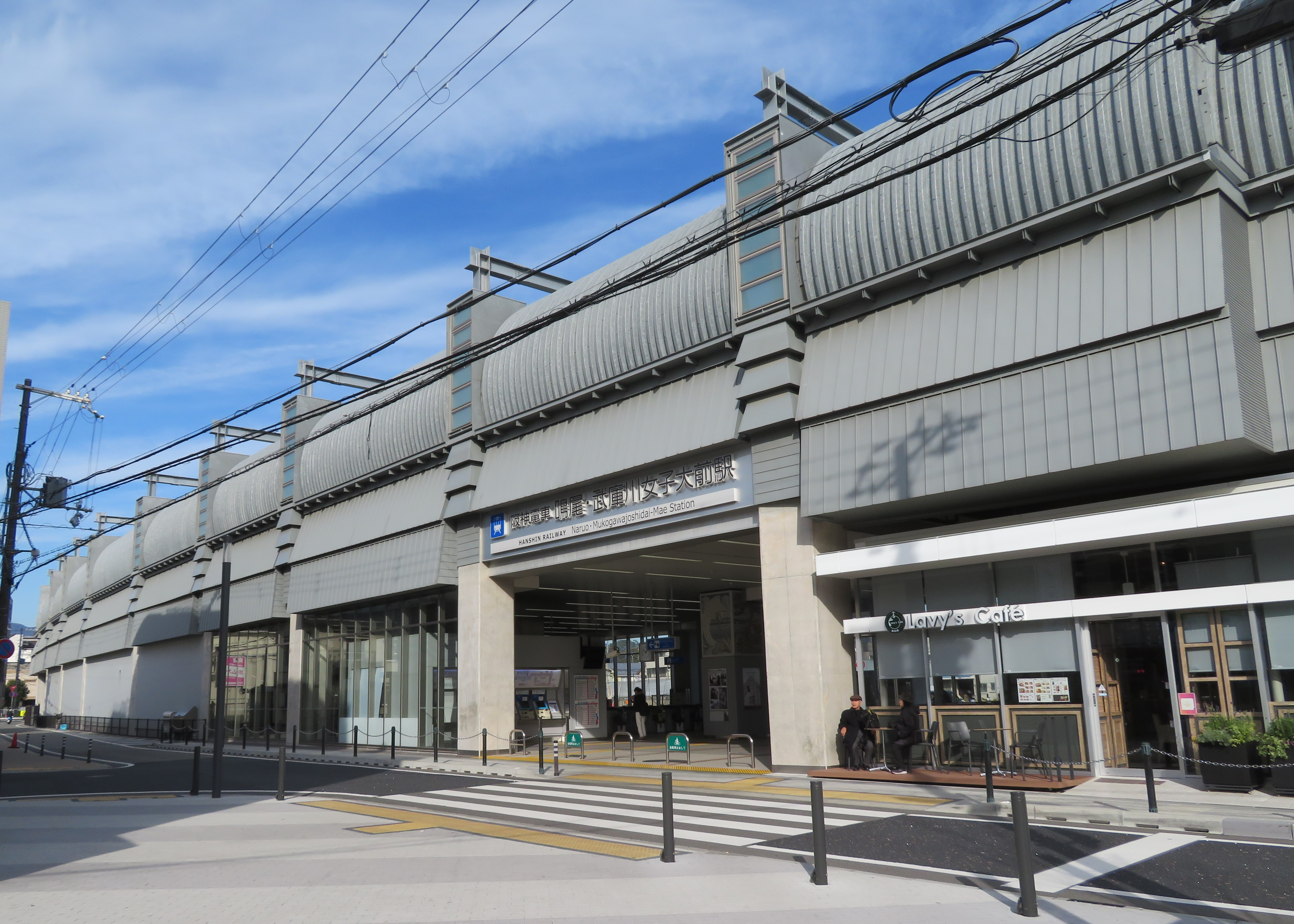 鳴尾・武庫川女子大前駅